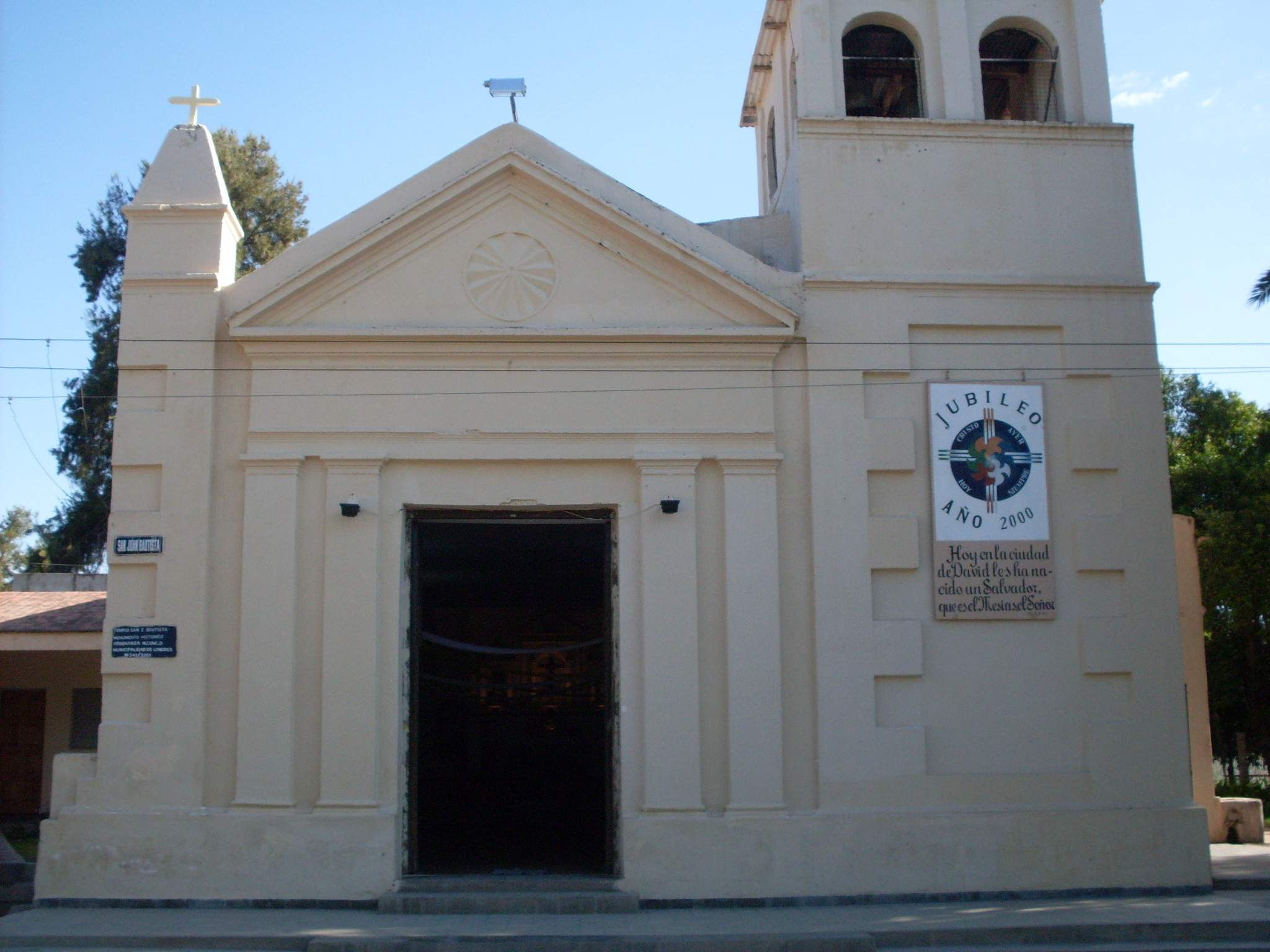 Templo San Juan Bautista, Londres, Catamarca.